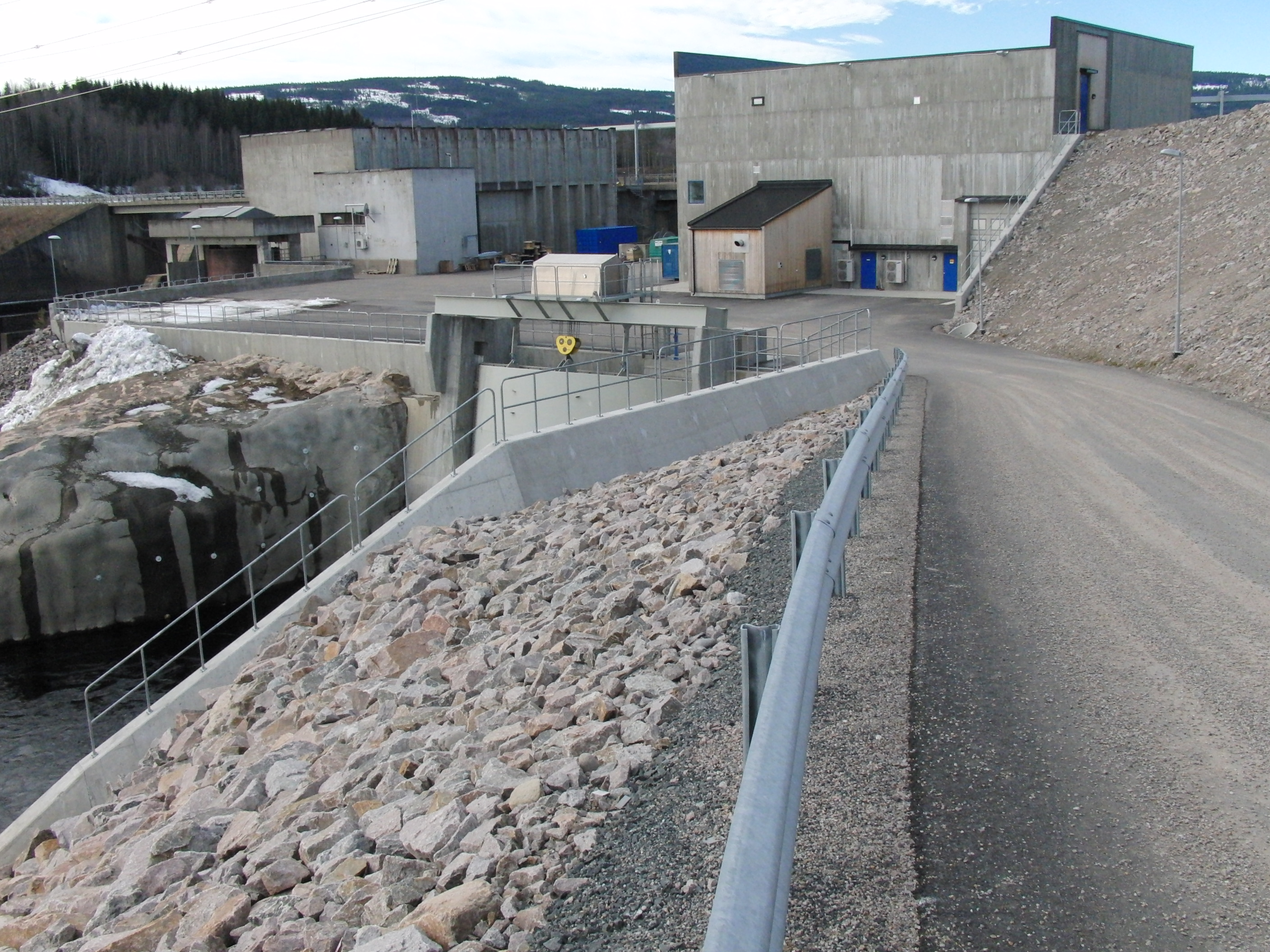 Brakereidfoss kraftverk 2017